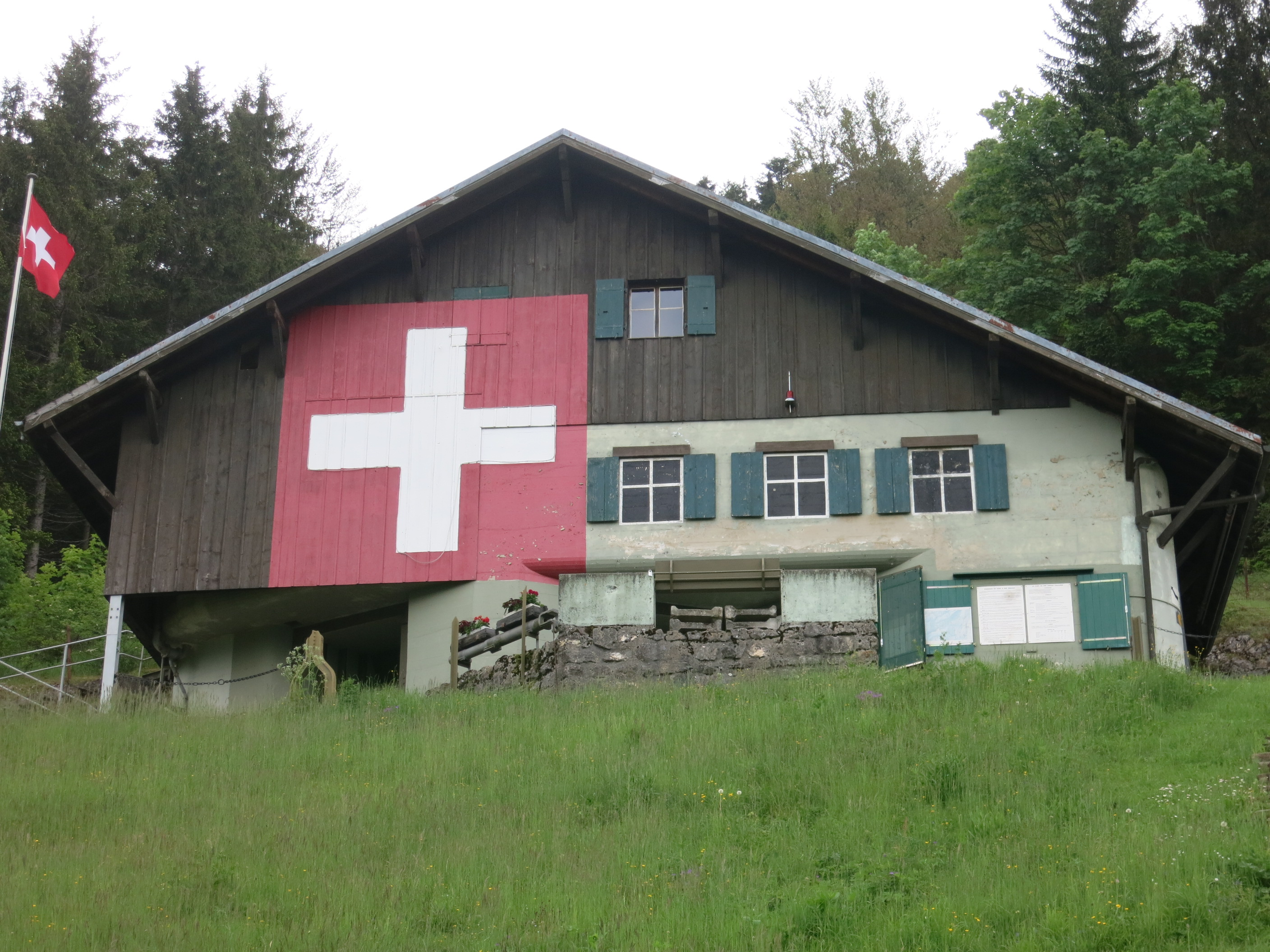 Artilleriewerk Pré-Giroud, Vallorbe VD, Schweiz